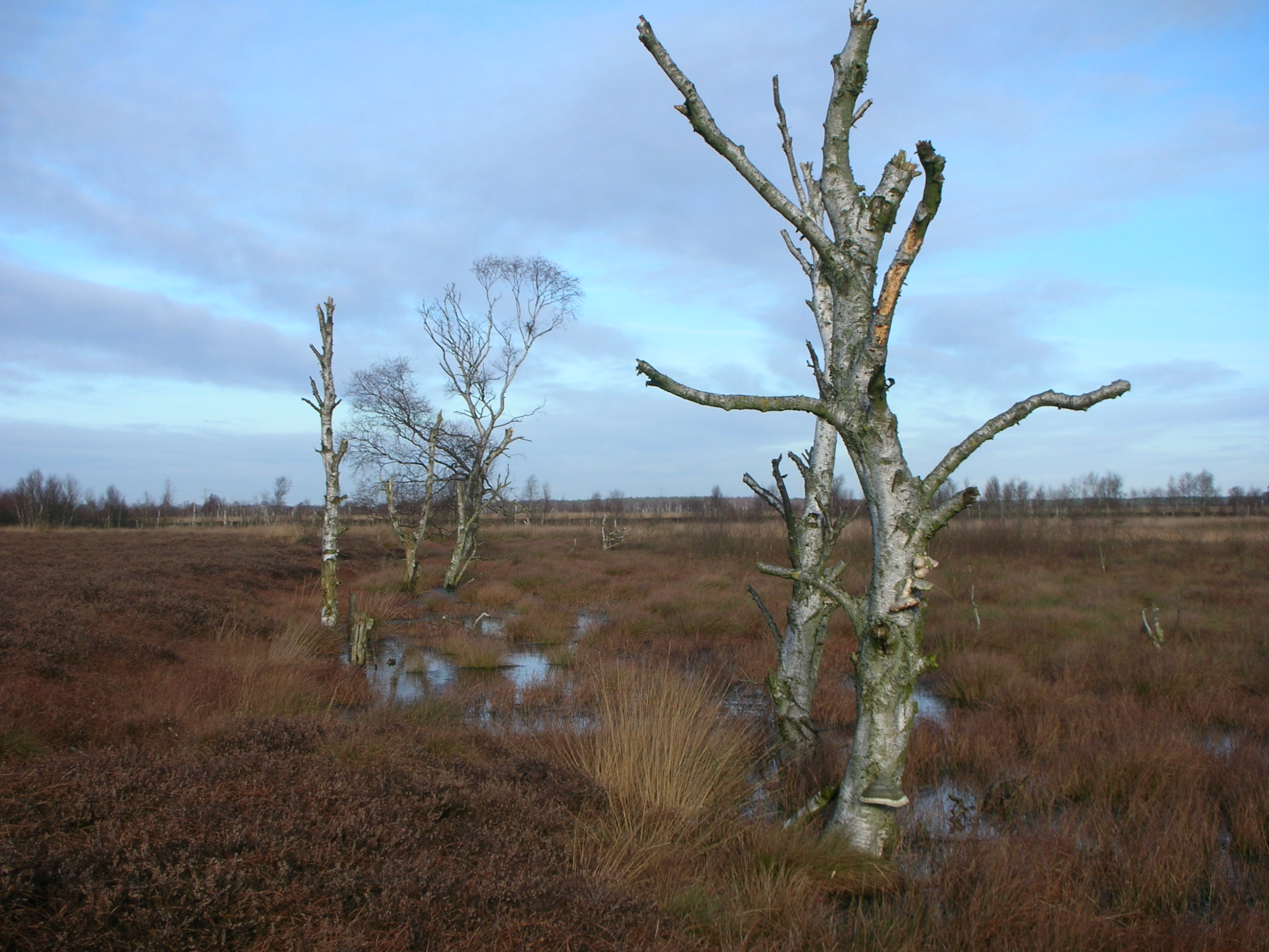 Idyll im südlichen Wietingsmoor (Naturschutzgebiet „Neustädter Moor II“) nordöstlich von Neustadt, Landkreis Diepholz (Niedersachsen)